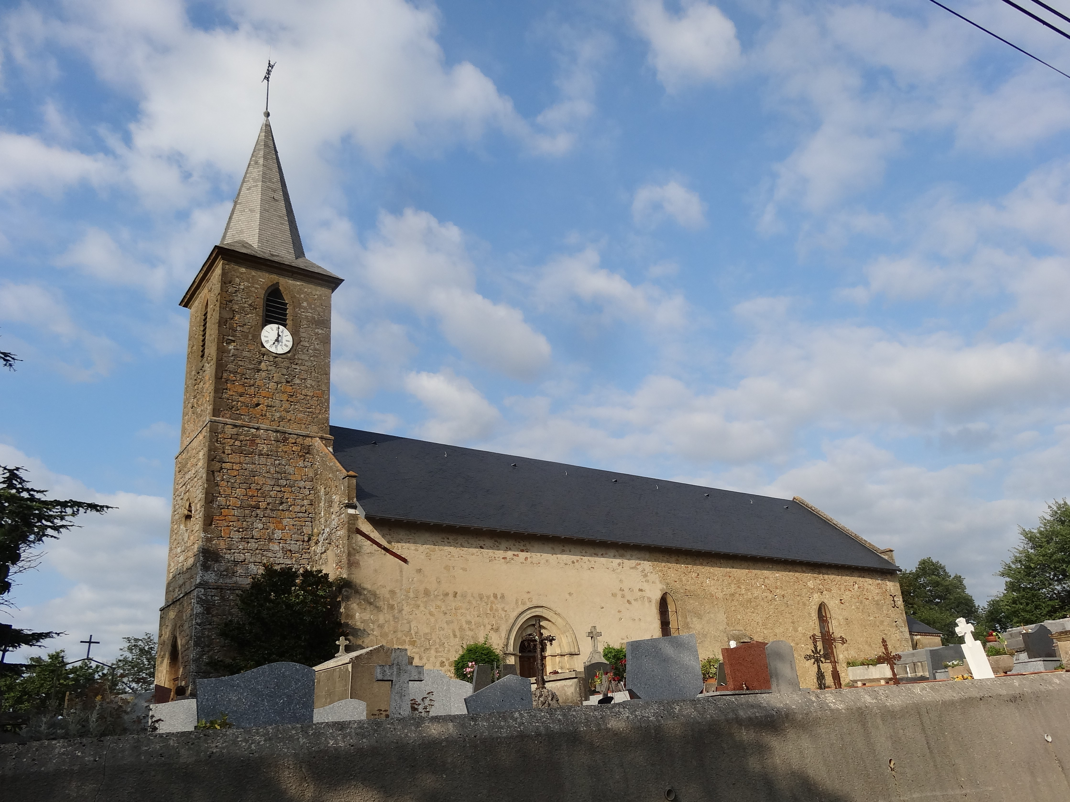 Rue principale de Monlezun.Église Saint-Martin de Monlezun